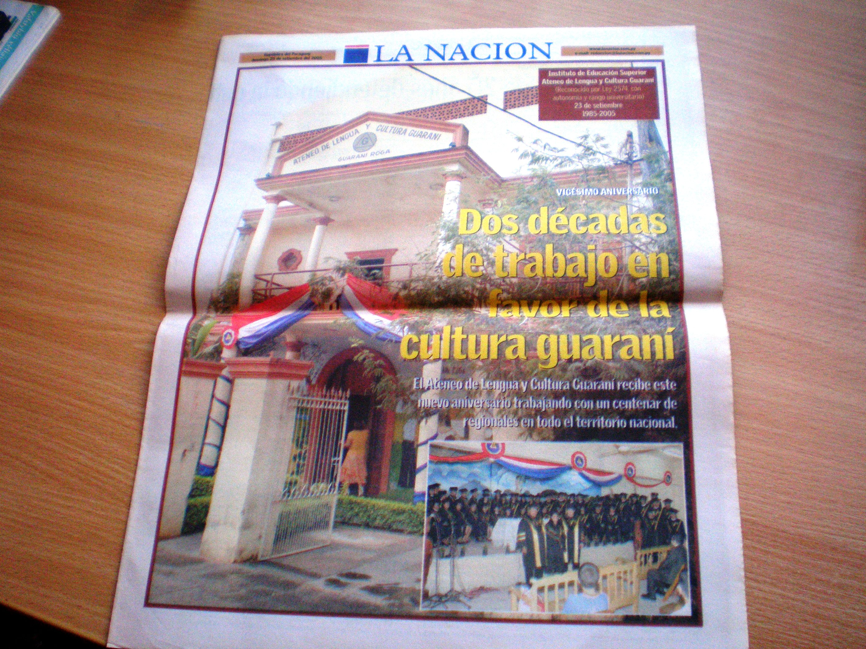 Pagina de periodico de Paraguay "La Nacion"